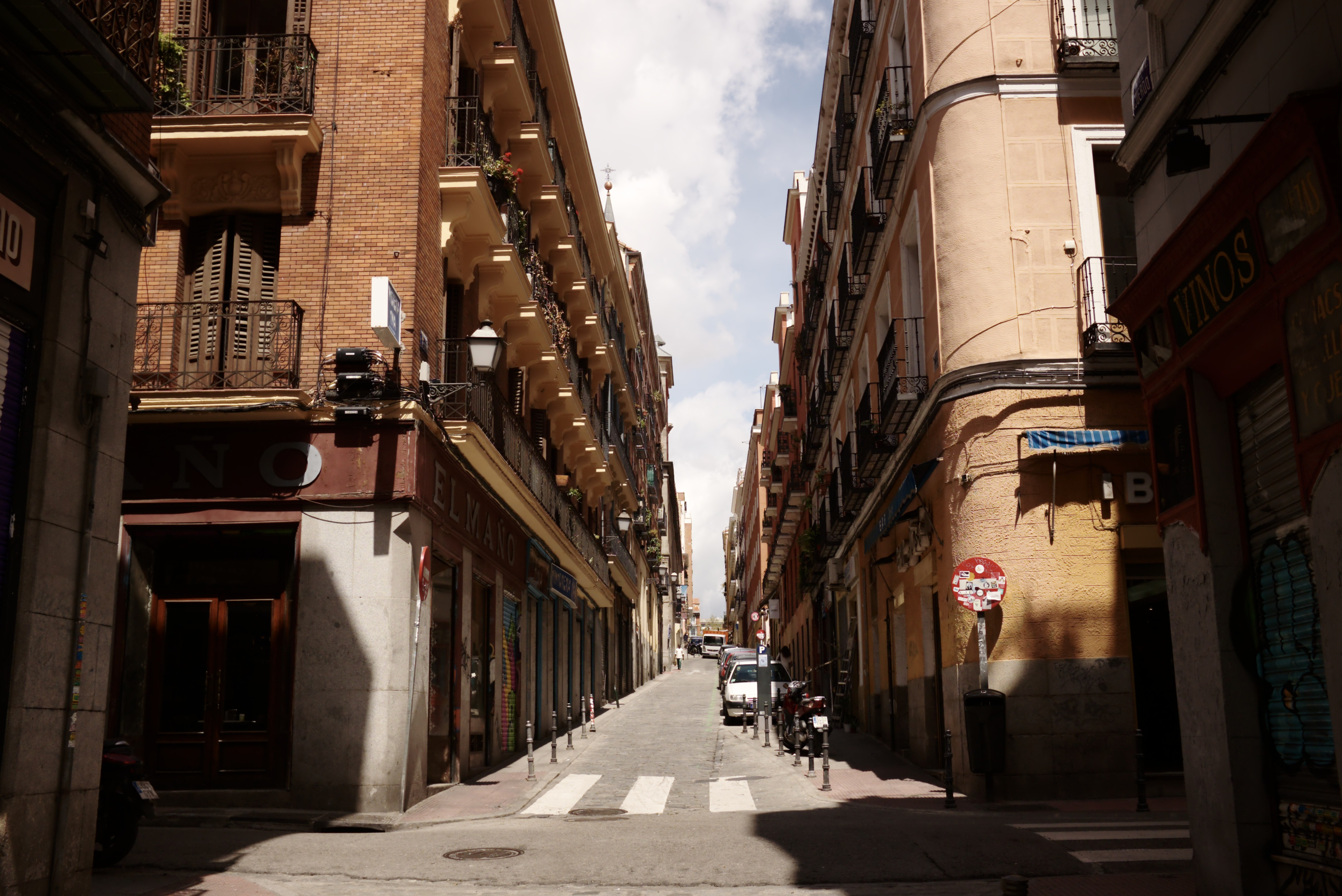 Calle de la Palma 64 esquina con calle del Acuerdo, Madrid, España.